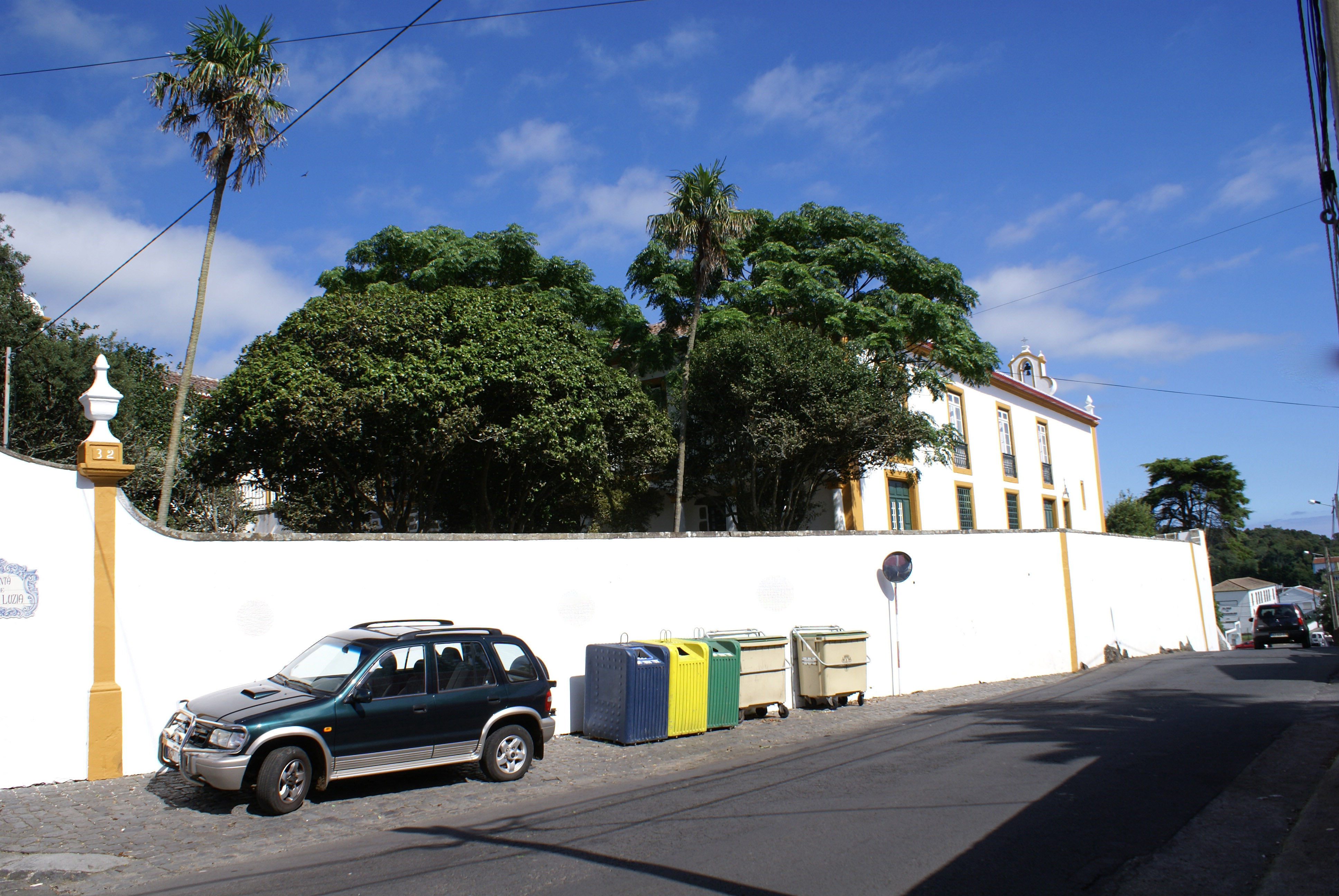 Quinta de Santa Luzia, Terra Chã, Angra do Heroísmo, Açores, Arquivo de Villa Maria, Terceira, Açores